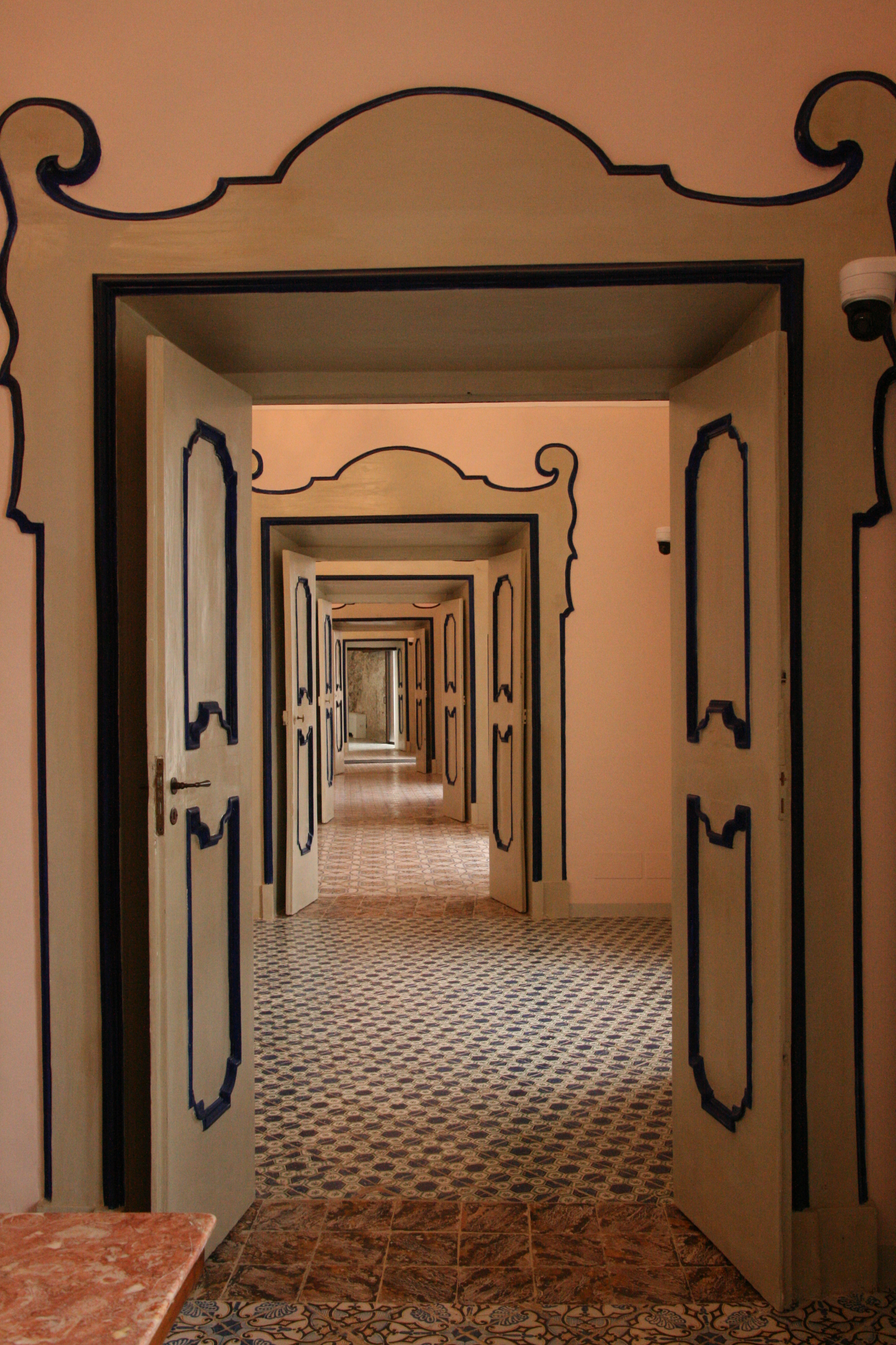 intérieur de la villa Rufolo à Ravello sur la côte amalfitaine en Italie